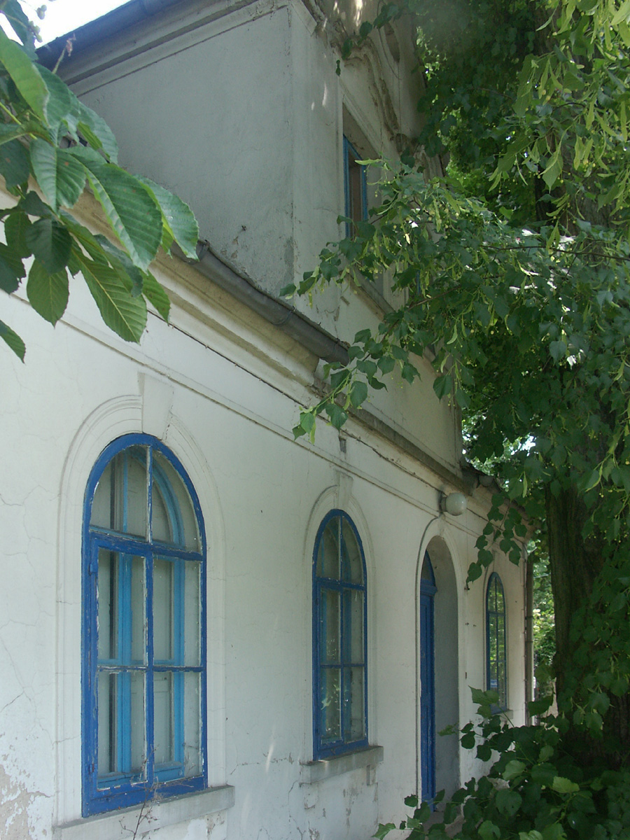 Ehemalige Schenke für das Wasser des Seegeler Wunderbrunnens